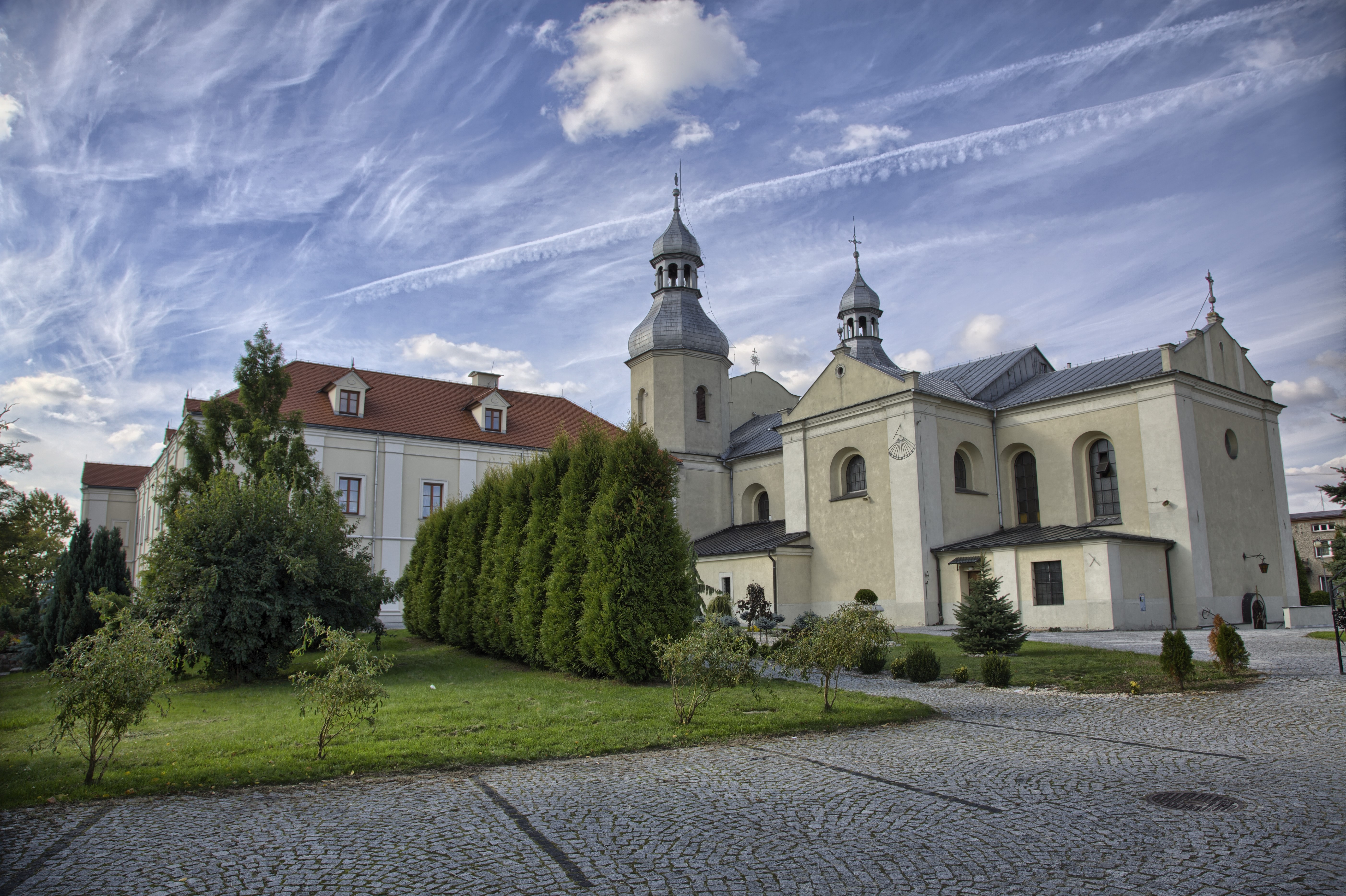 Wieruszów, zespół klasztorny paulinów, 2 poł. XVII, 1880